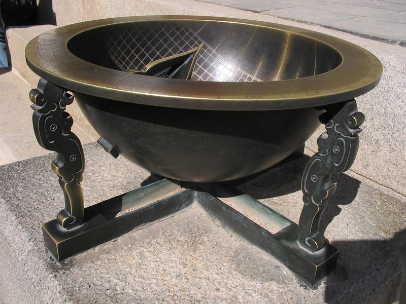 Date : février 2005 Source : photo personnelle du contributeur Mammique Description : Horloge solaire conservée au palais Gyeongbokgung à Séoul en Corée. Licence